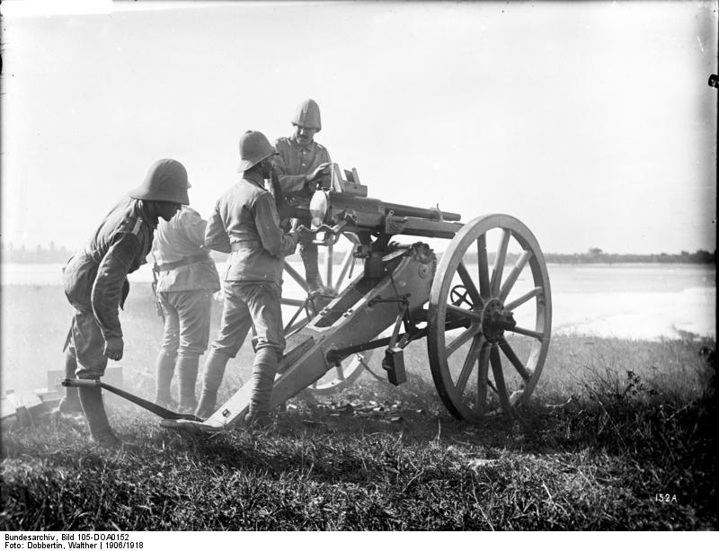 An der Revolverkanone